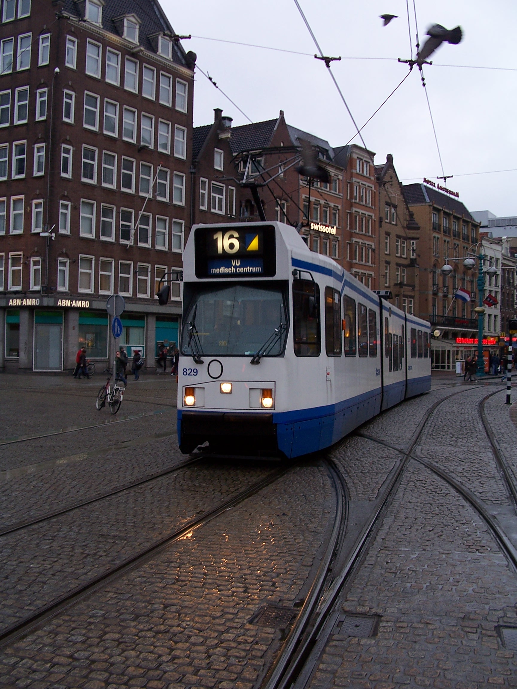 Tramlijn 16 in Amsterdam; op de Dam